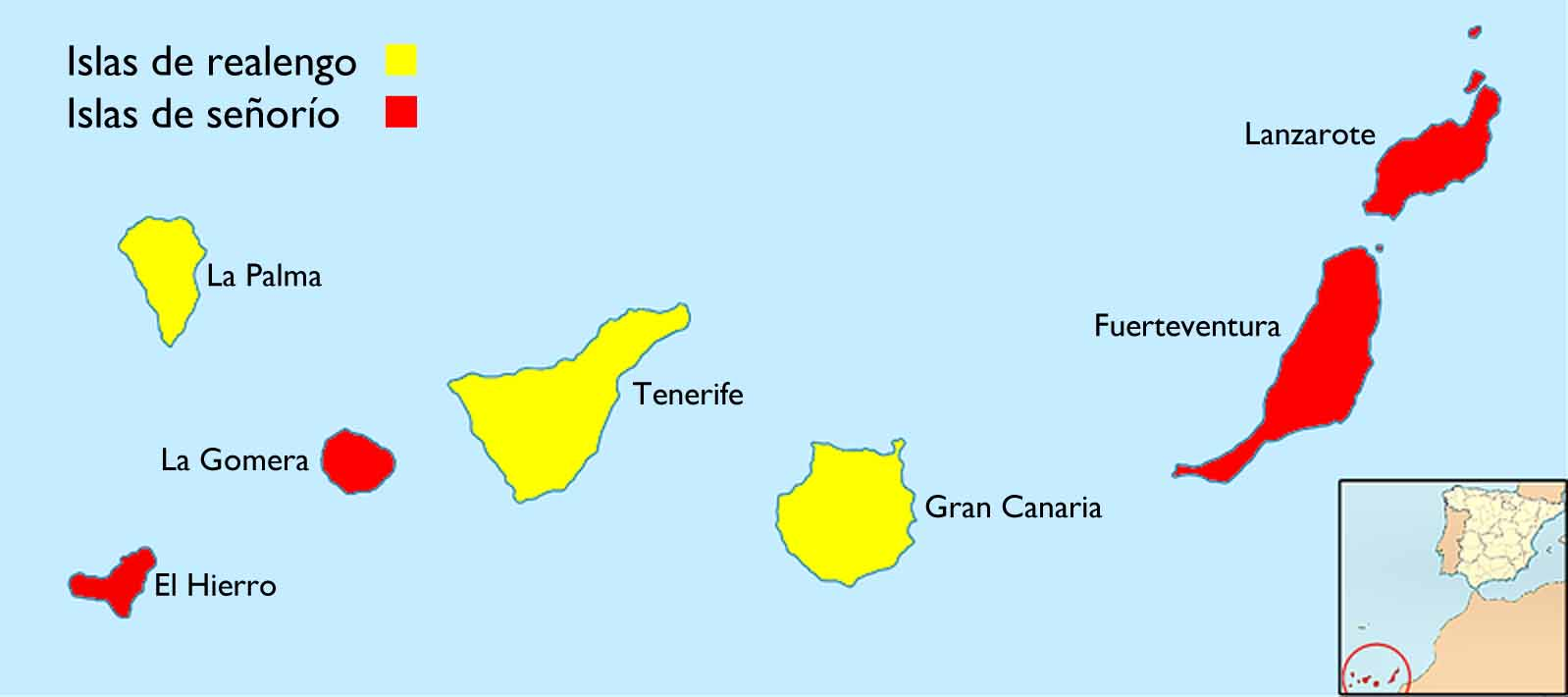 Einteilung der Kanarischen Inseln in islas de realengo und islas de señorío